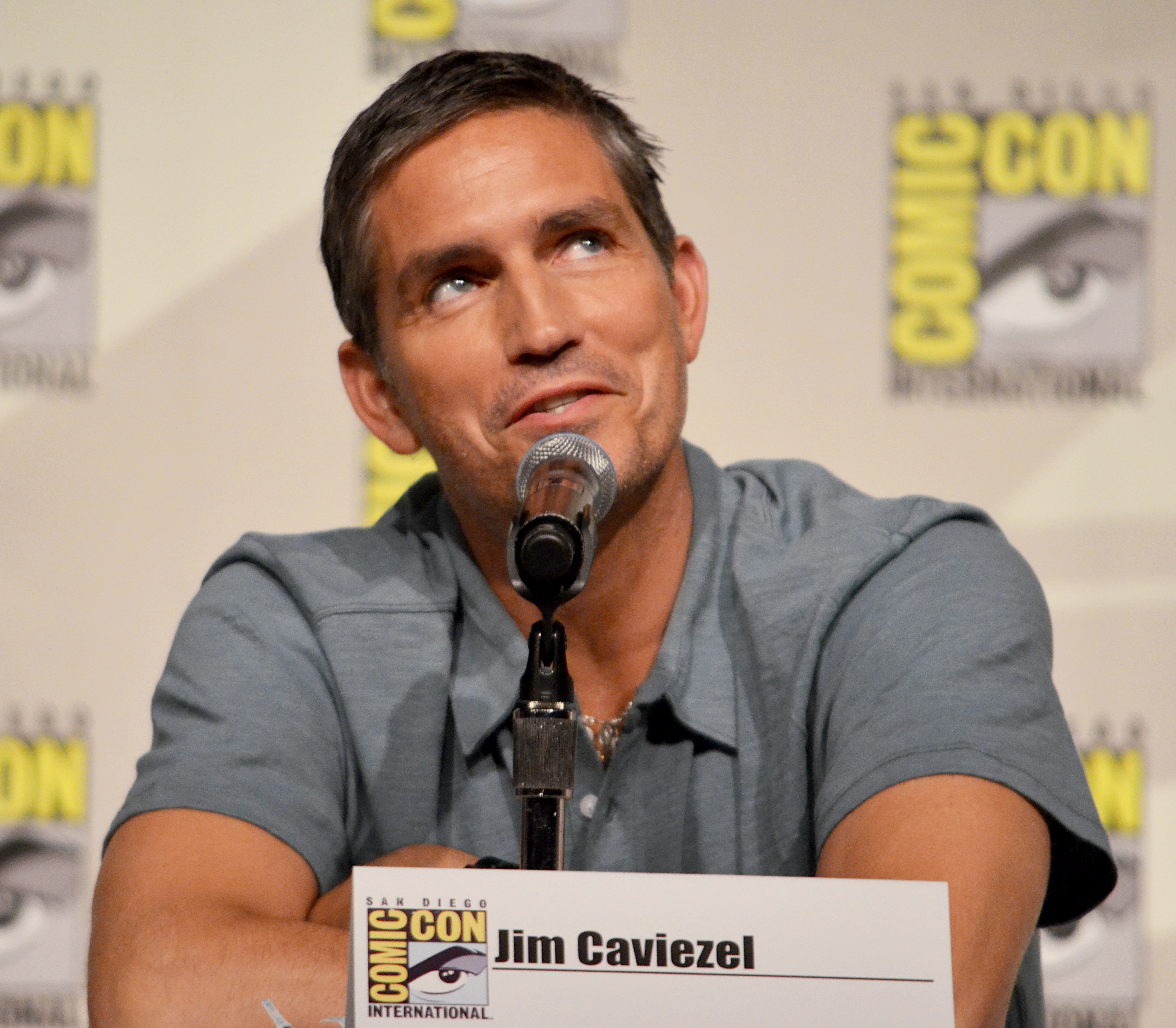 Jim Caviezel